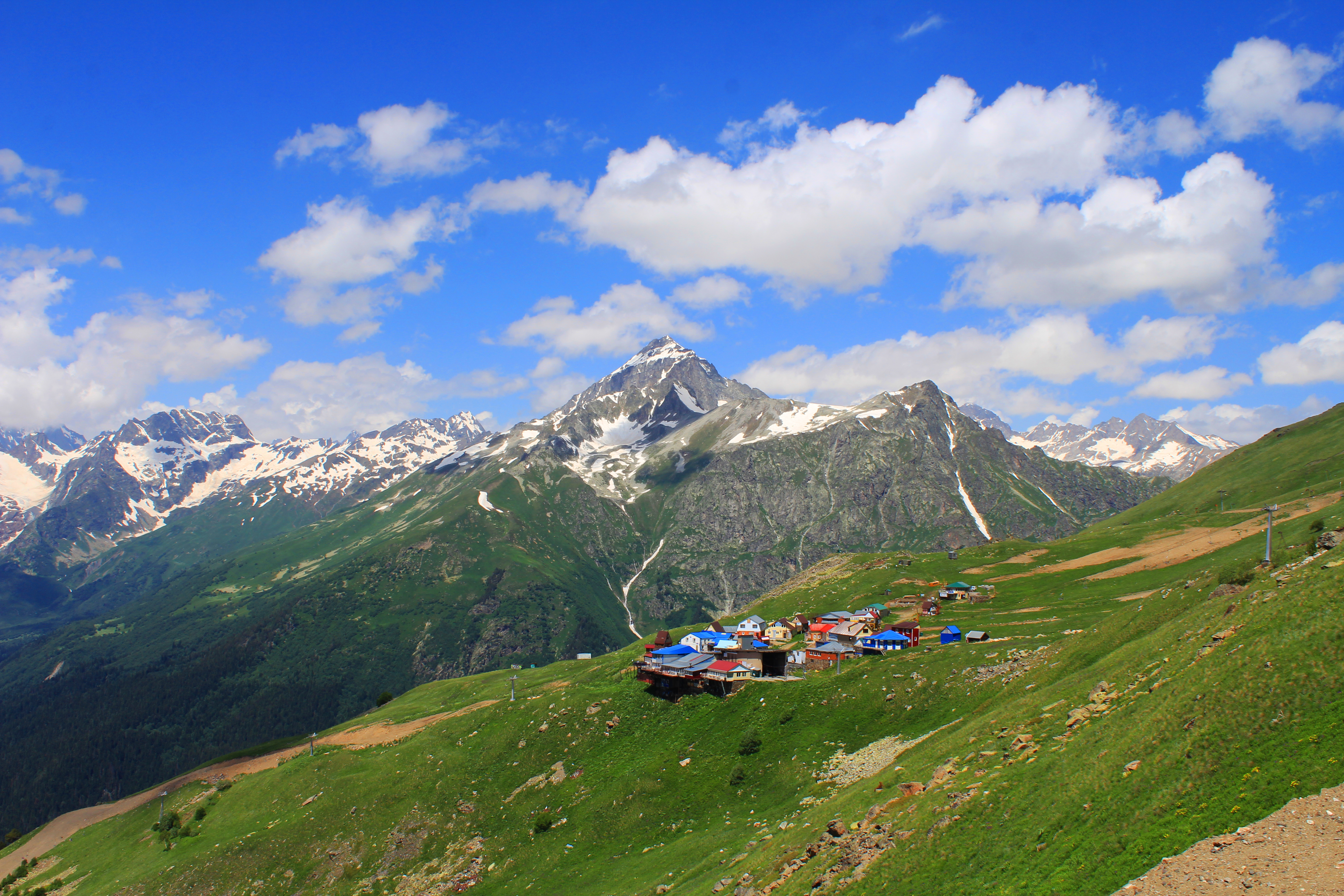 Теберда: Карачаевск, Карачаево-Черкесия This image is related to the protected area of Russia number 0900023